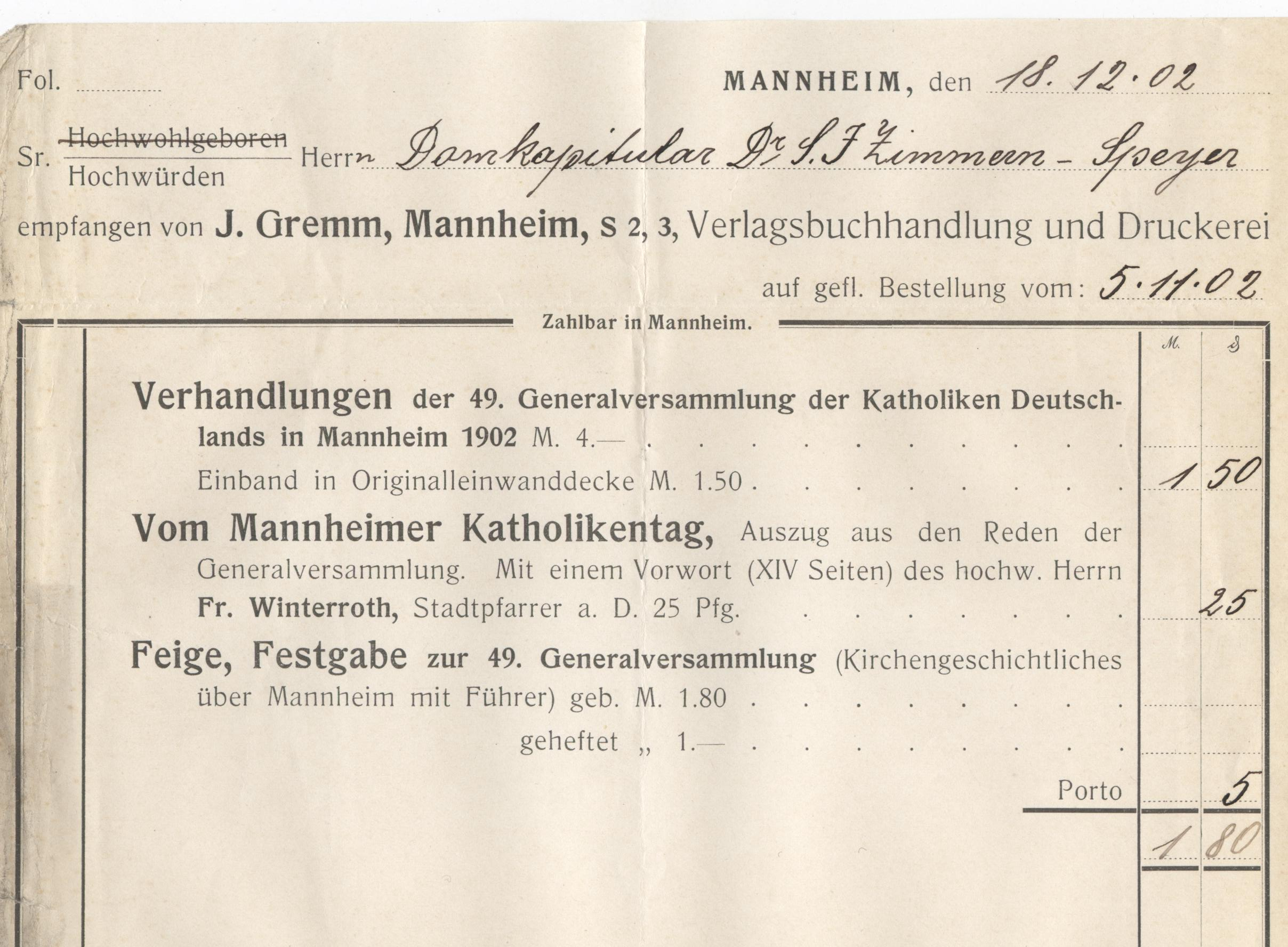 Domkapitular Sigmund Zimmern Speyer, Buchrechnung aus seinem persönlichen Besitz